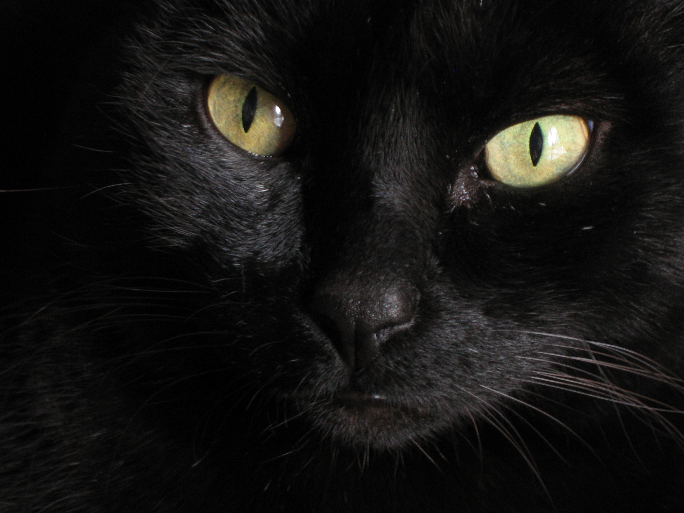 Ojos de un gato negro